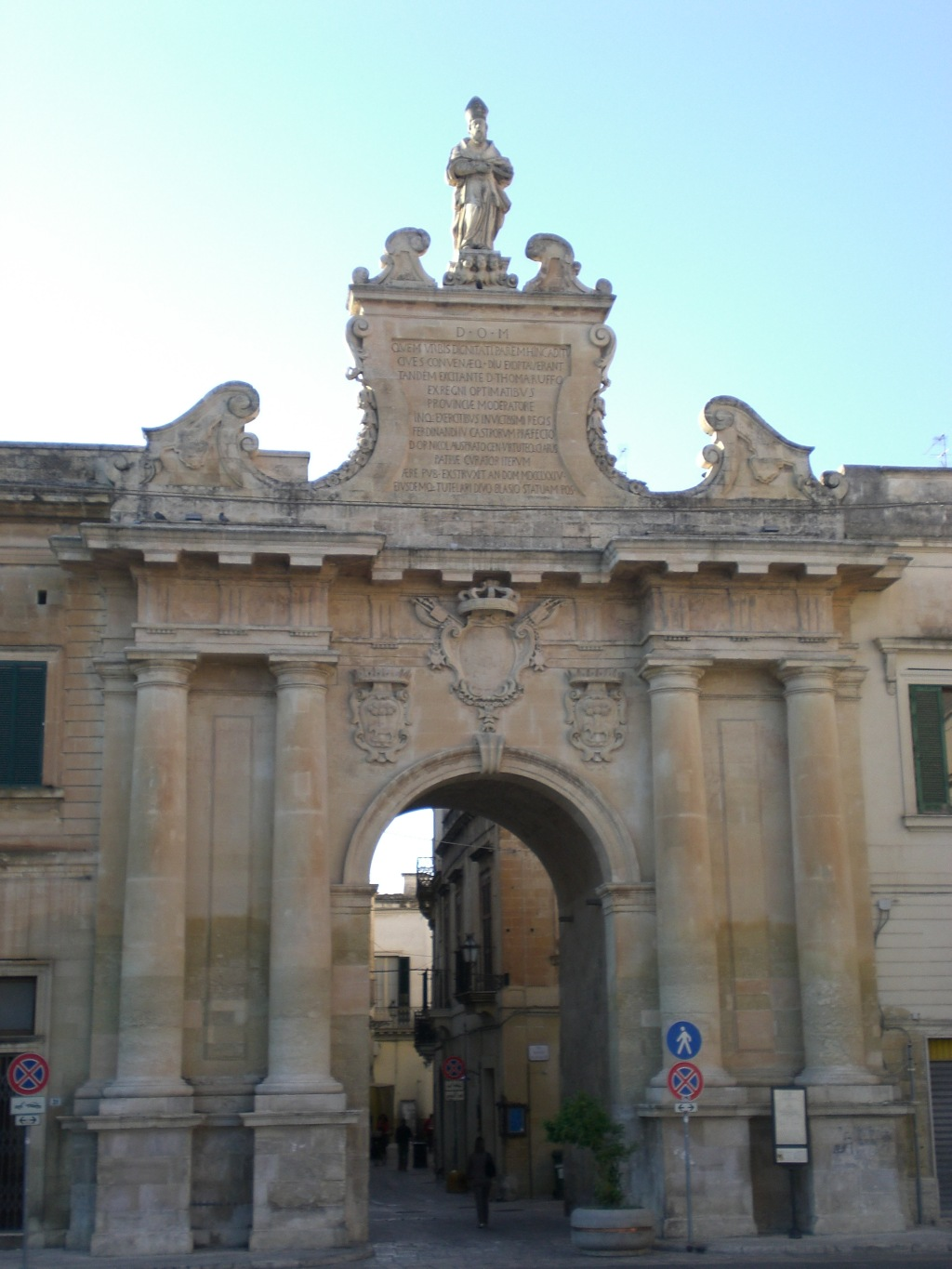 porta san biagio a Lecce